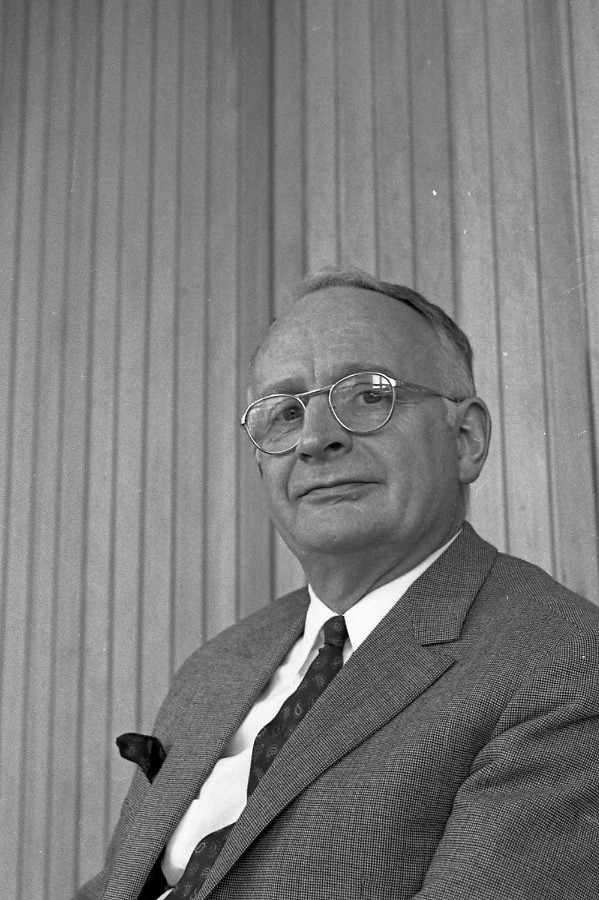 Aad van Wijngaarden rond 1978.